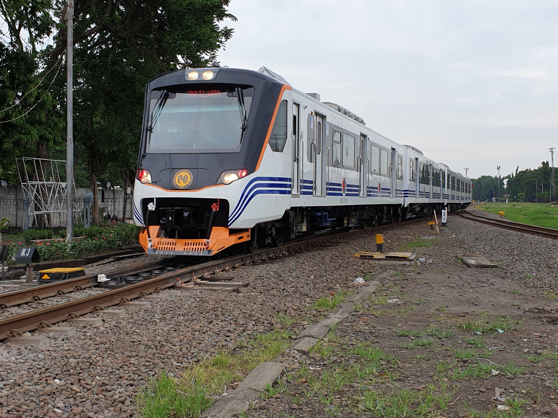 Kereta rel diesel (KRD) buatan PT INKA untuk Philippine National Railway (PNR).